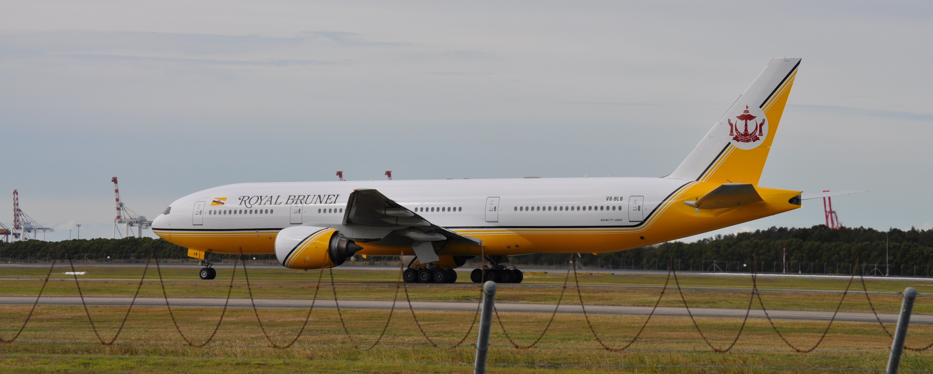 Royal Brunei Airlines, V8-BLB.